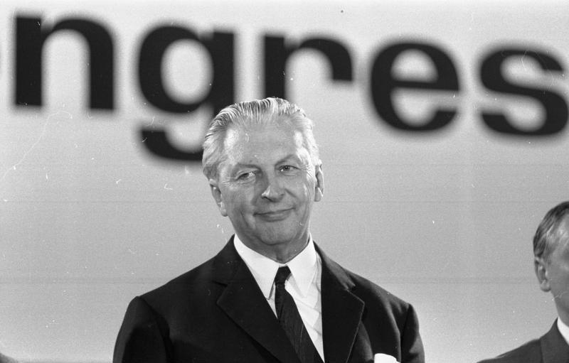 Bundeskanzler Kiesinger spricht vor dem CDU Wahlkongress in Essen im städtischen Saalbau